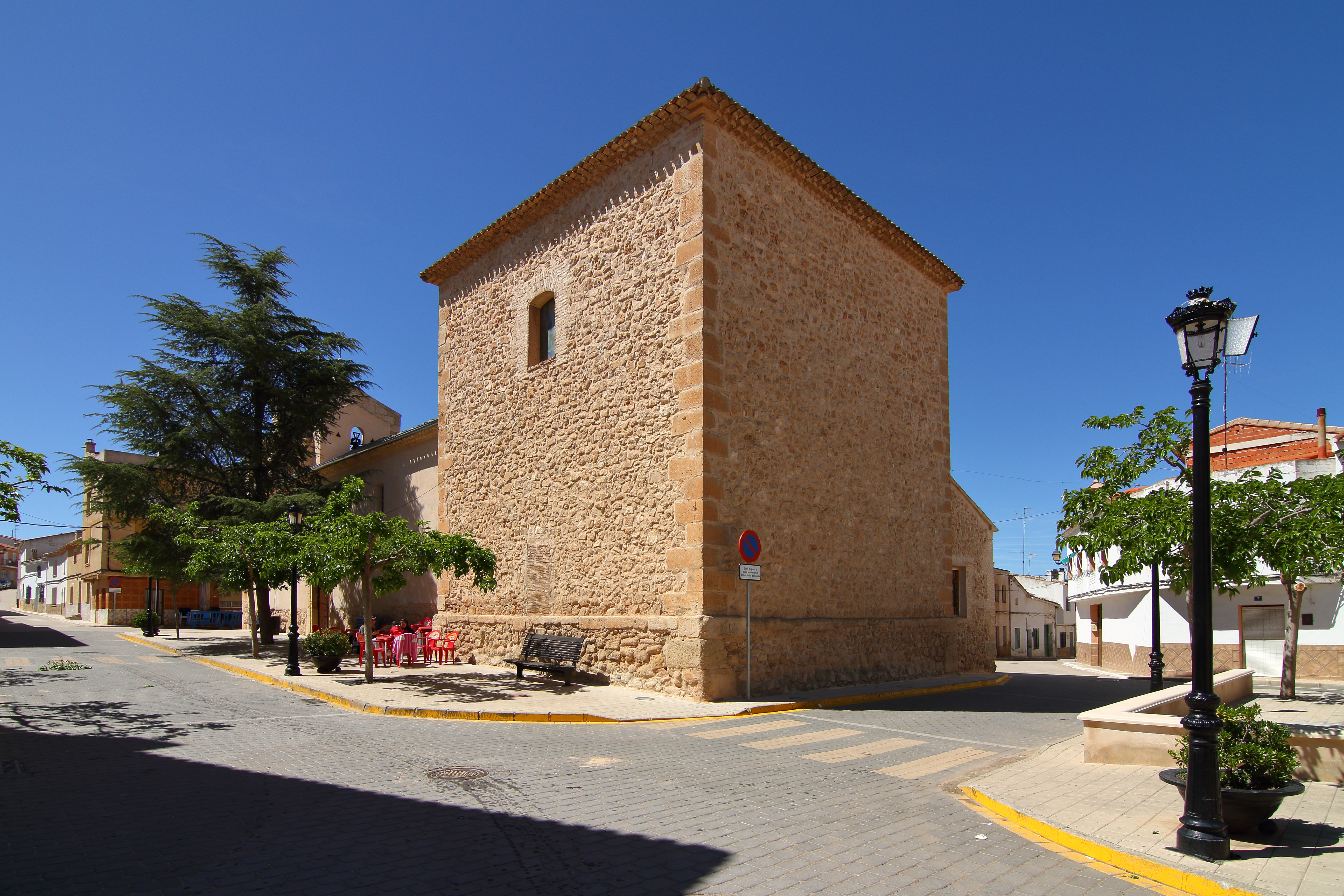 La Pesquera, Iglesia de Purificación de María